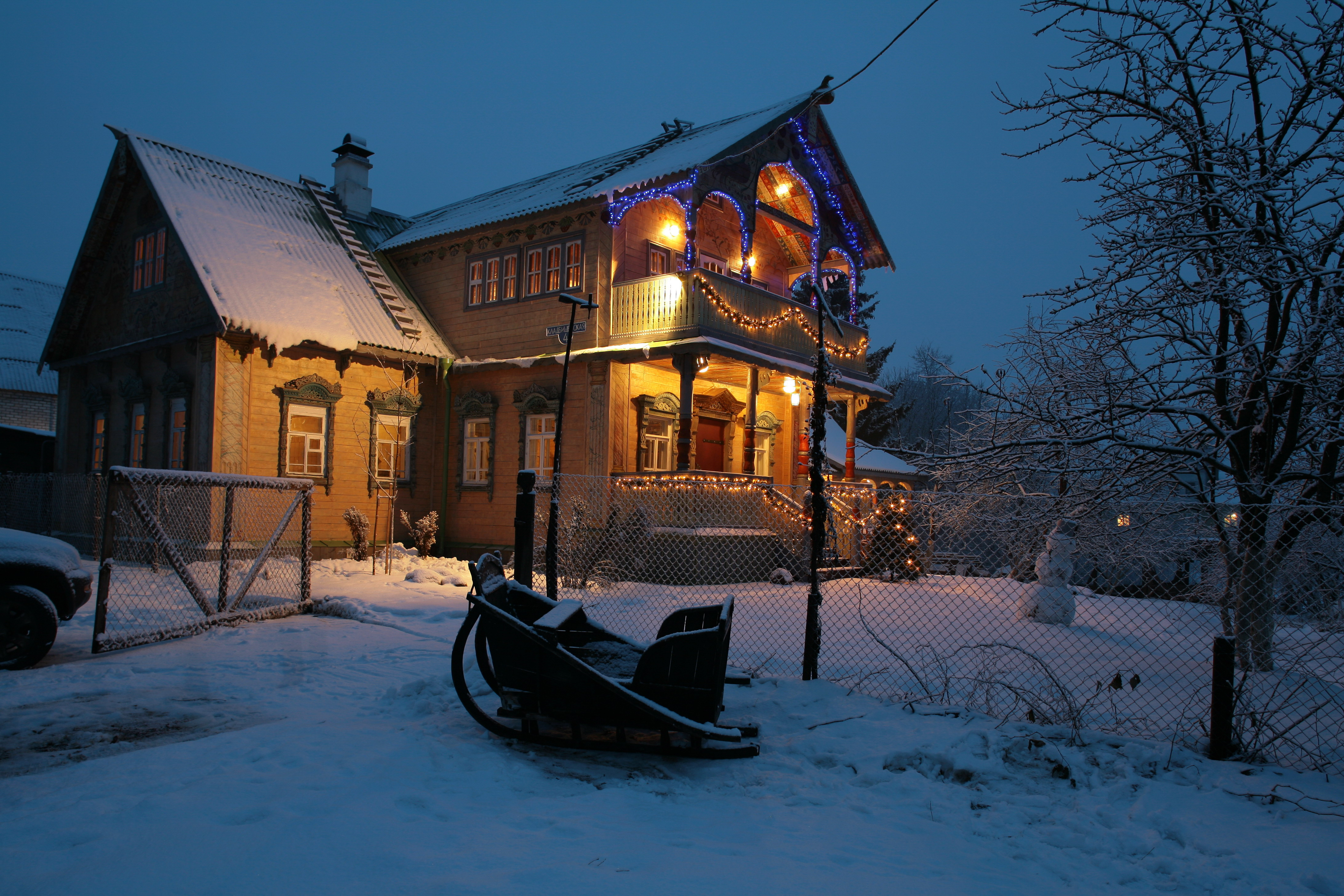 Город Мышкин. Творческая дача фонда "Шуховская башня" (shukhov.ru)